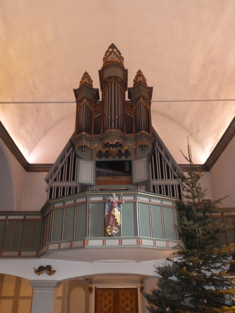 Blick auf den Prospekt der historischen Orgel